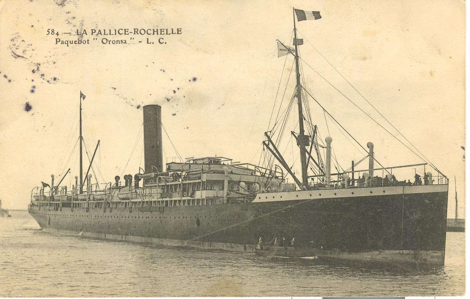 Der Dampfer Oronsa der Pacific Steam Navigation Company